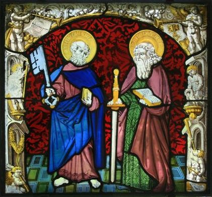 Wappenscheibe (West III 2) im Kreuzgang des Klosters Wettingen: Petrus (mit Schlüssel) und Paulus (mit Schwert)